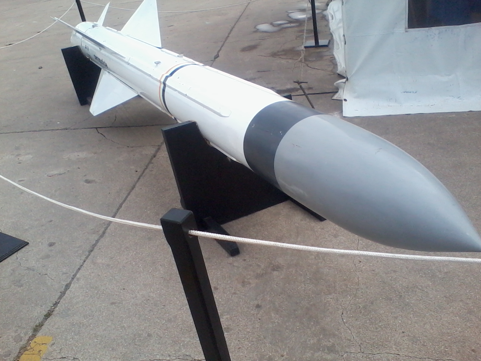 Misil Exocet